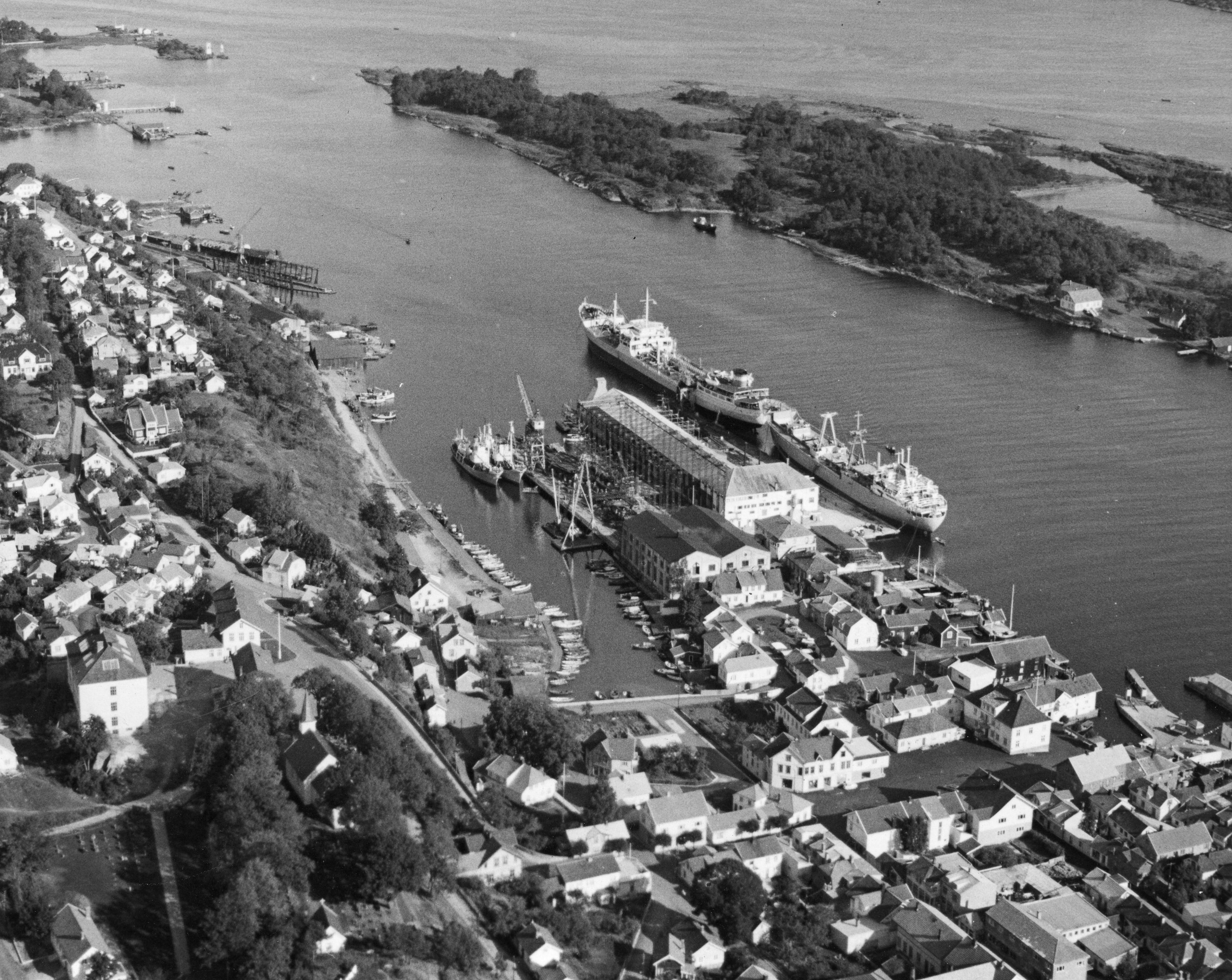 Oversiktsbilde over Langesund mekaniske verksted